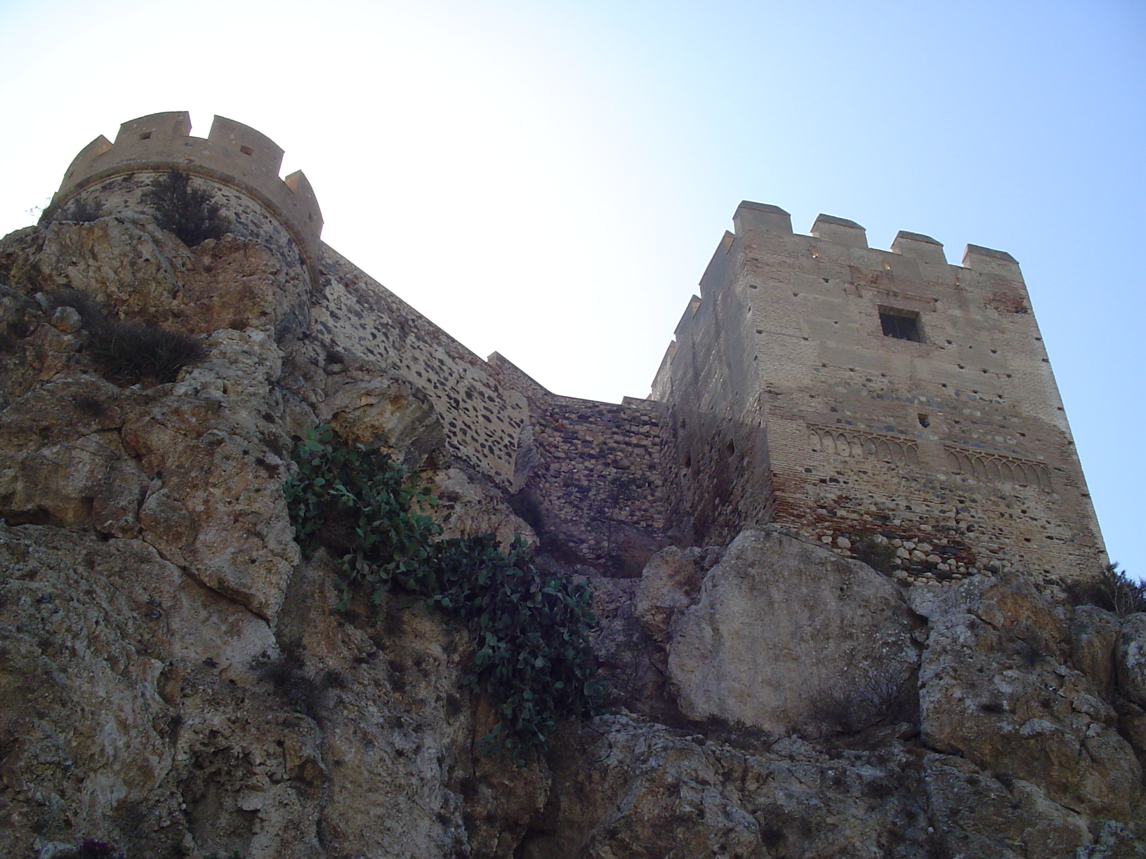 Castillo de Salobreña (Granada, España)